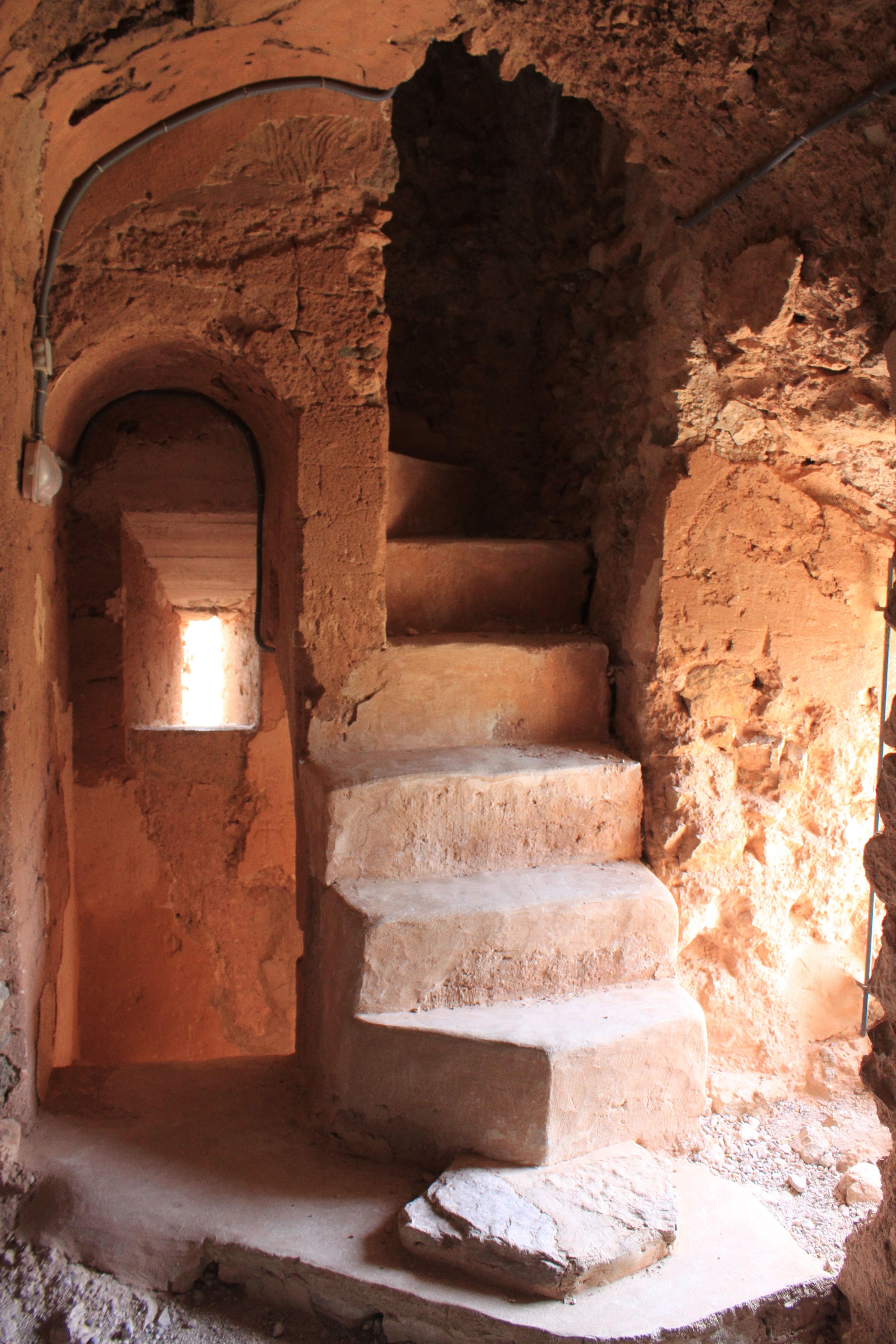 Castillo de Beselga. Vista de la estancia de vigilancia de la torre y escalera de acceso a la estancia residencial superior y al almacén inferior. Beselga, Estivella, provincia de Valencia, Comunidad Valenciana, España.